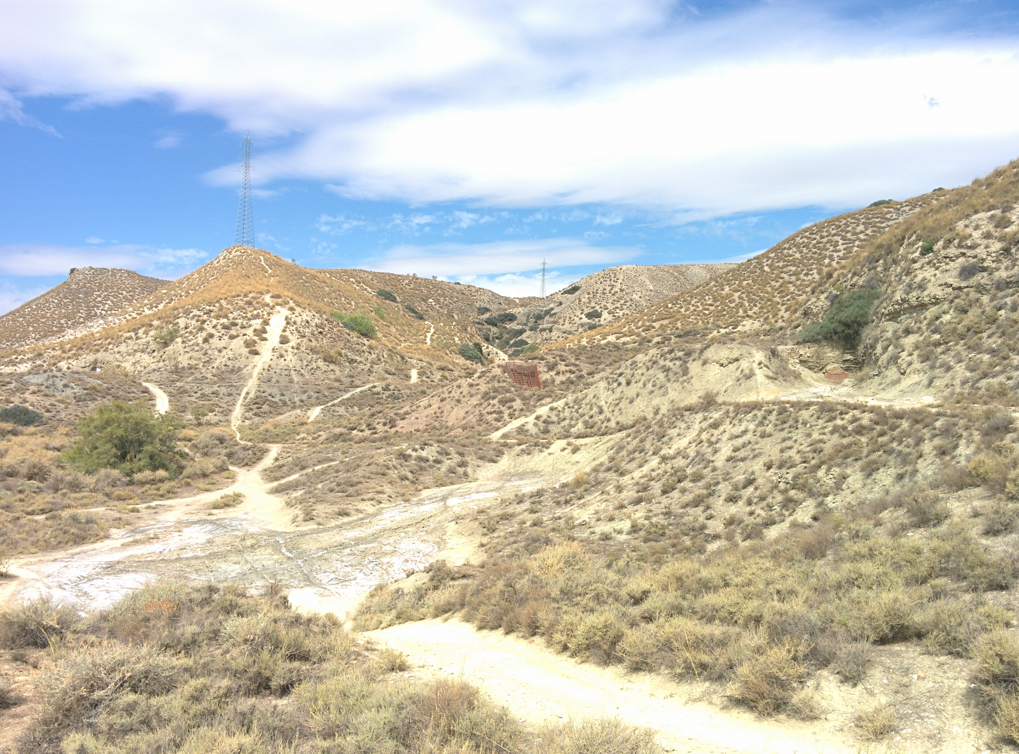 Salinas Espartinas, en Ciempozuelos (Madrid, España).